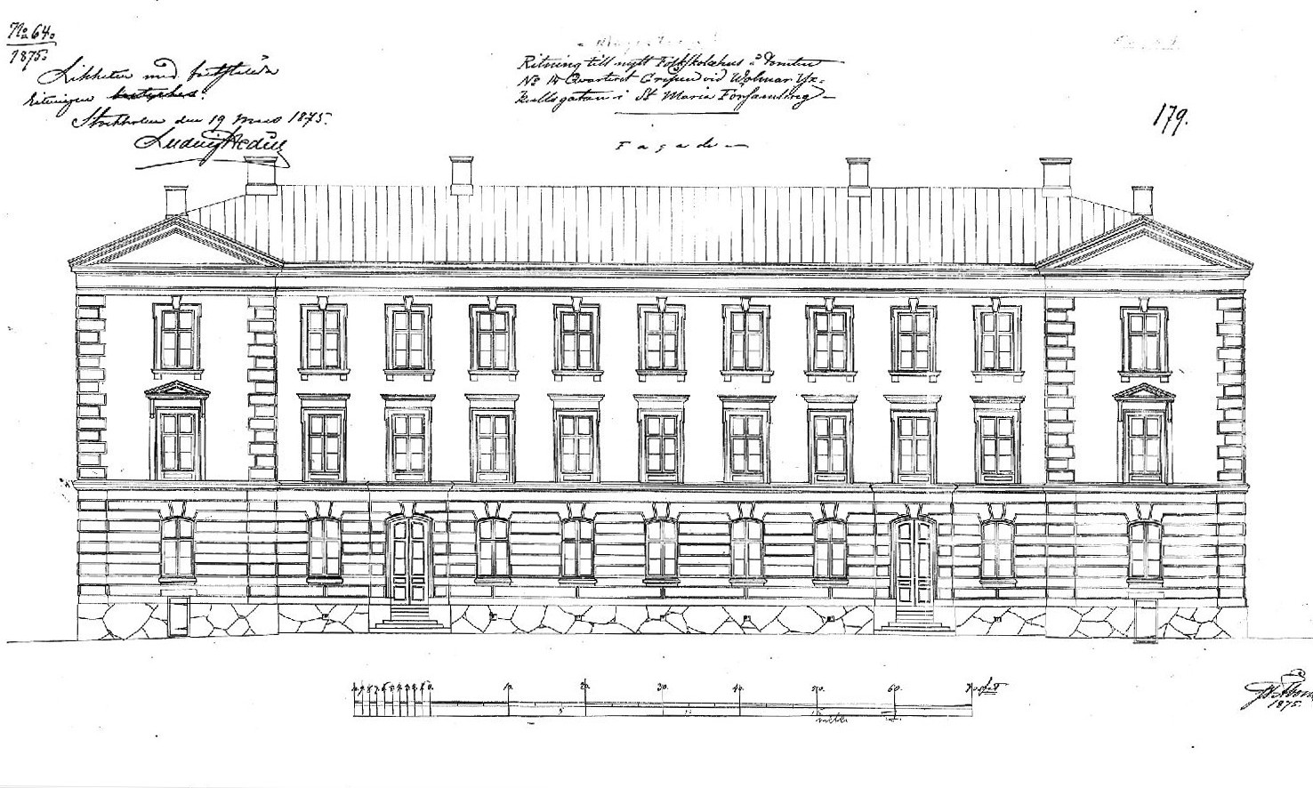 Maria gamla skola, fasadritning för västra skolhuset